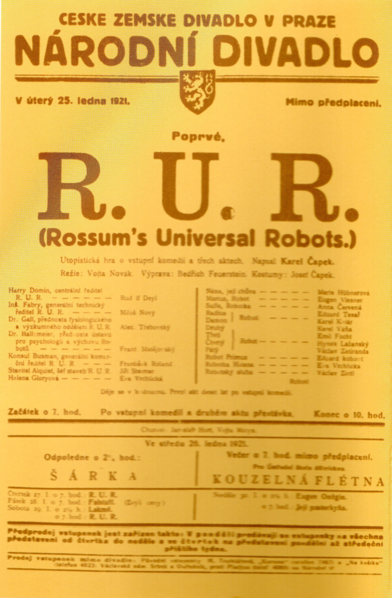 Original poster, first show, Prague, 25th January 1921.